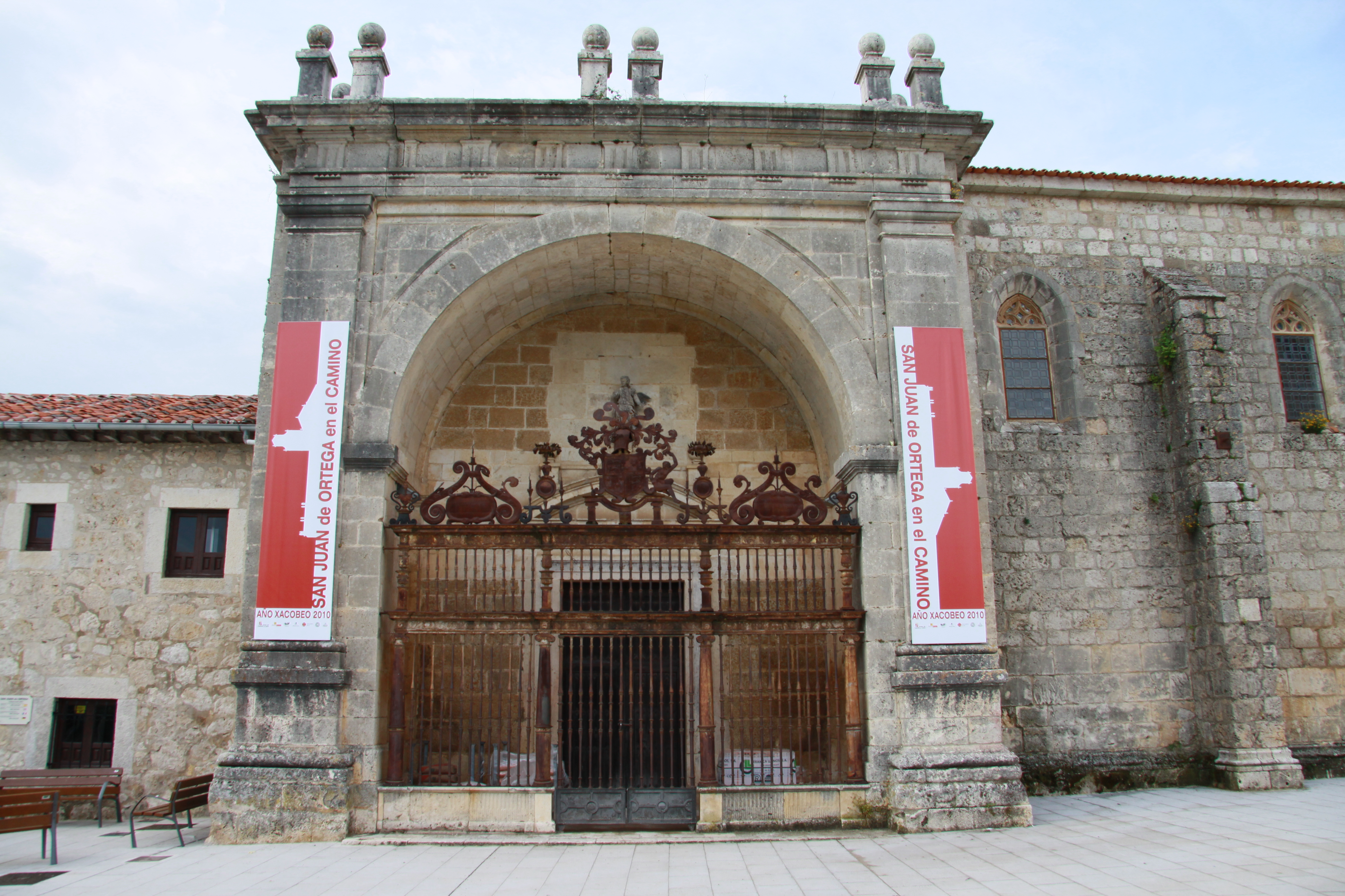 Portada de la capilla de San Nicolás, Monasterio de San Juan de Ortega (Burgos)